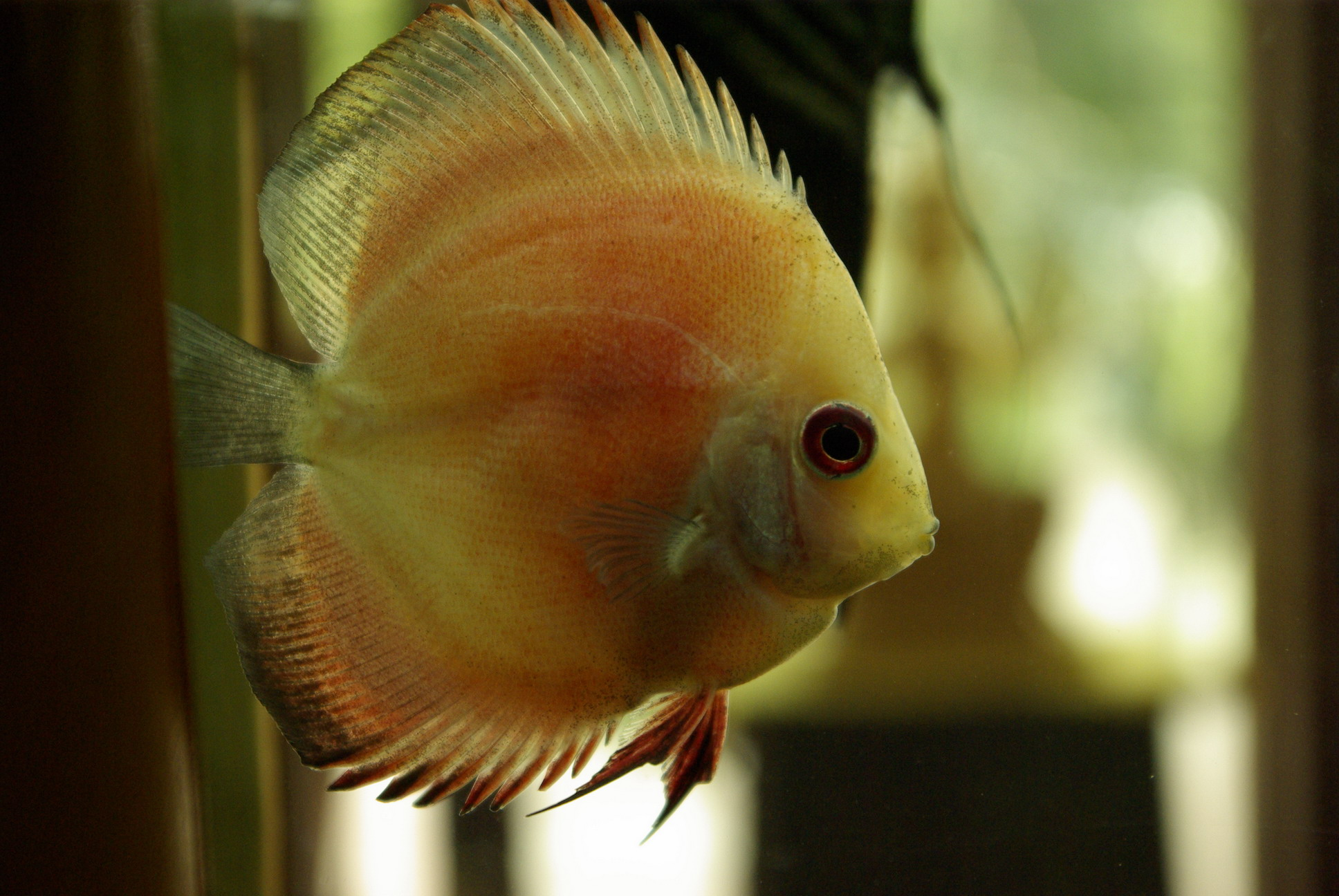 Symphysodon hybrid - Beijing, China